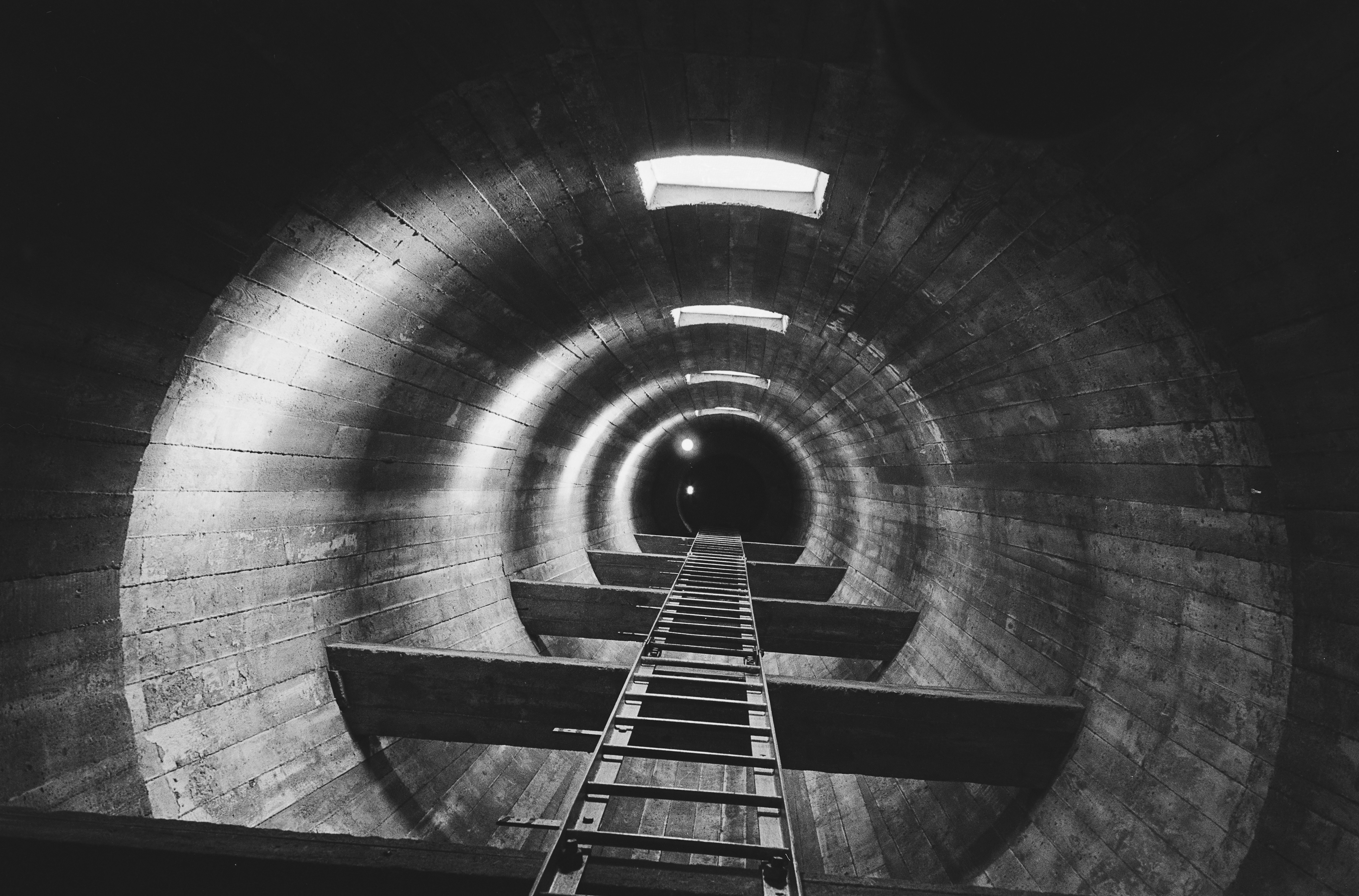 Kumlinge flygfyrs innandöme sett från botten.